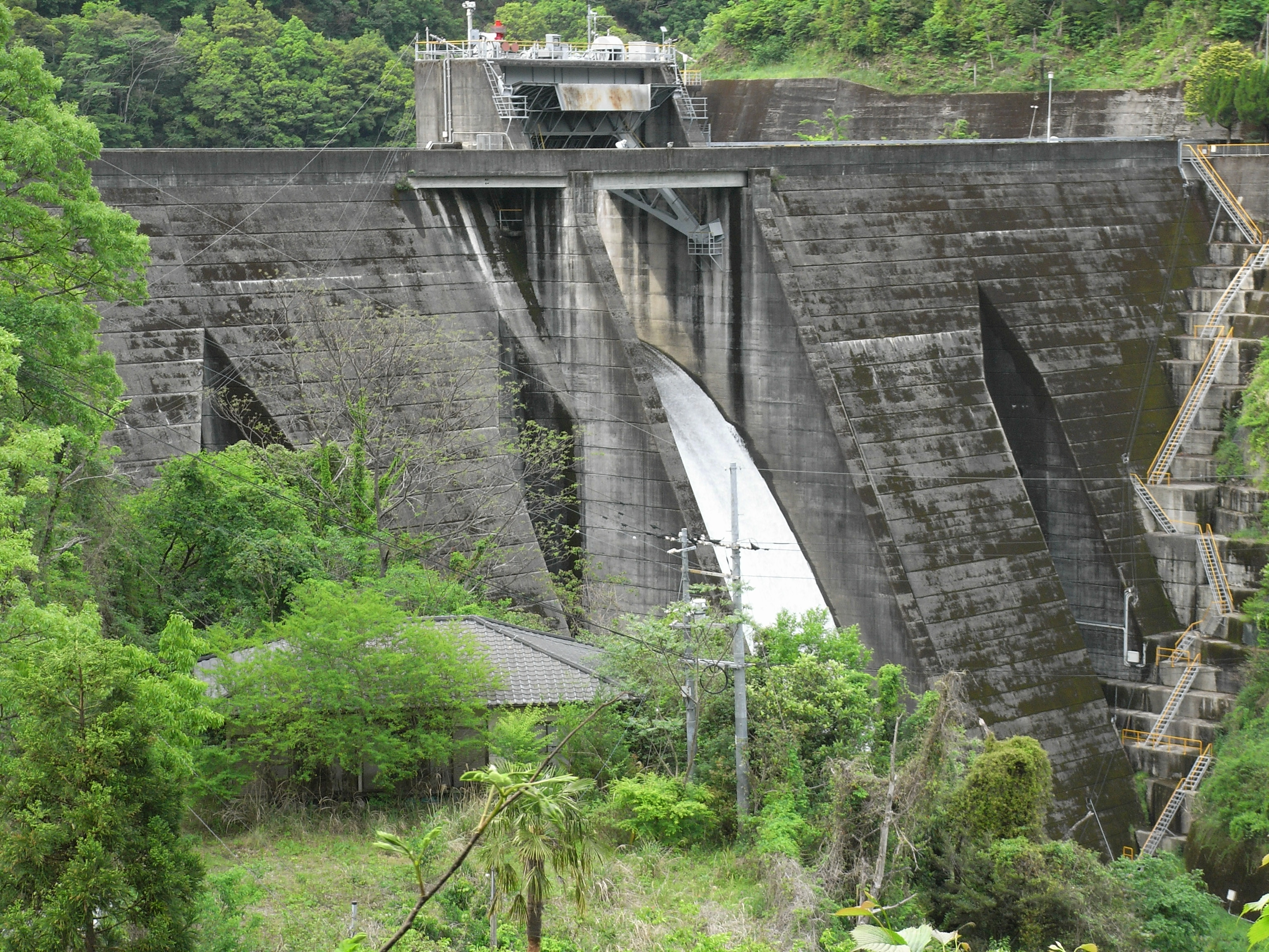 Dam